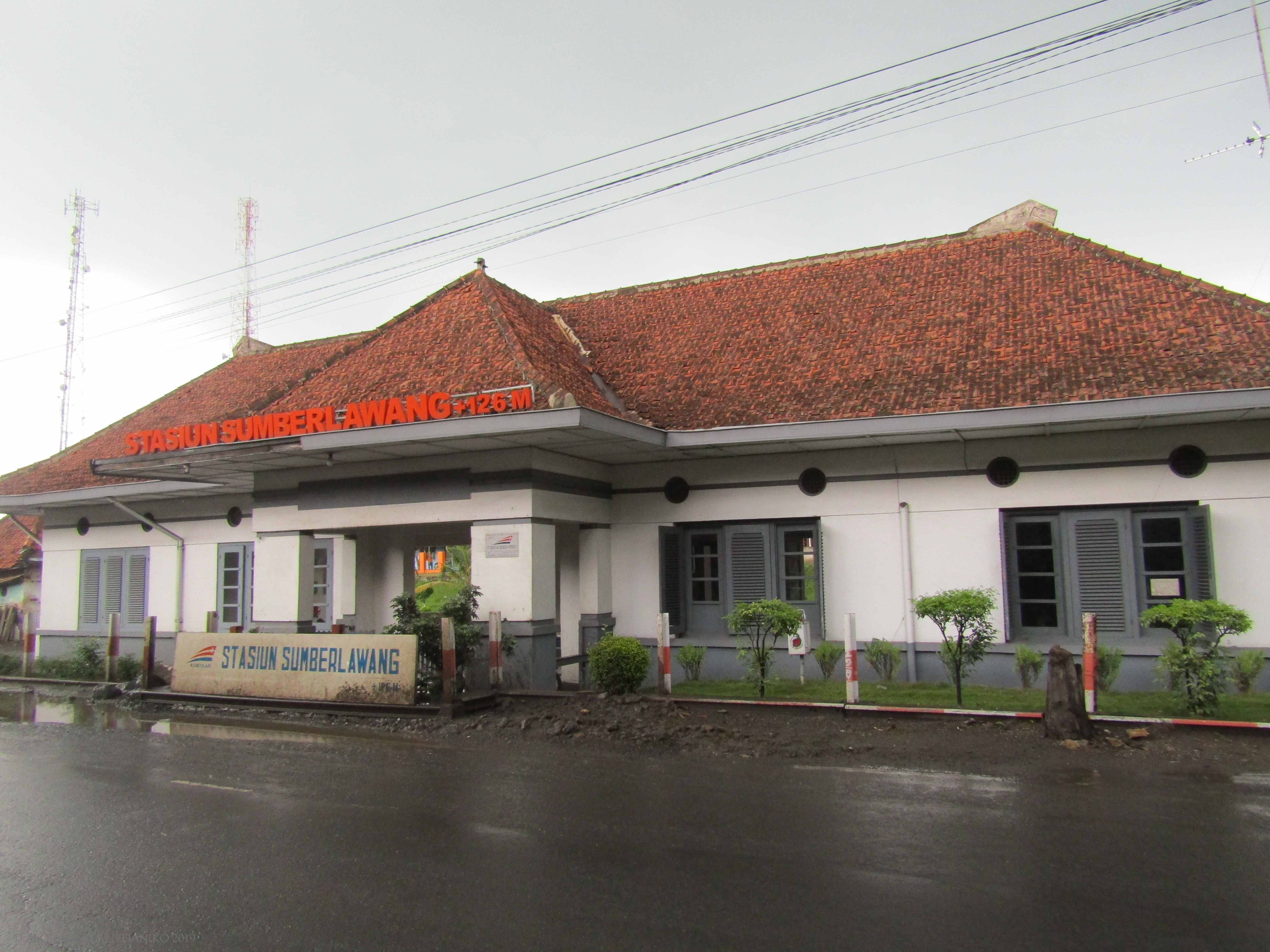 Tampak depan Stasiun Sumberlawang, 2019